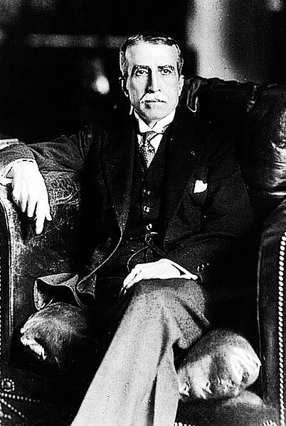 Augusto B. Leguía fue presidente del Perú durante el Oncenio